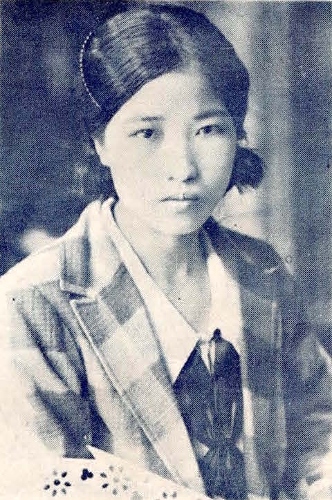 Bân-lâm-gú: 田英妹 Chhân Eng-mūi